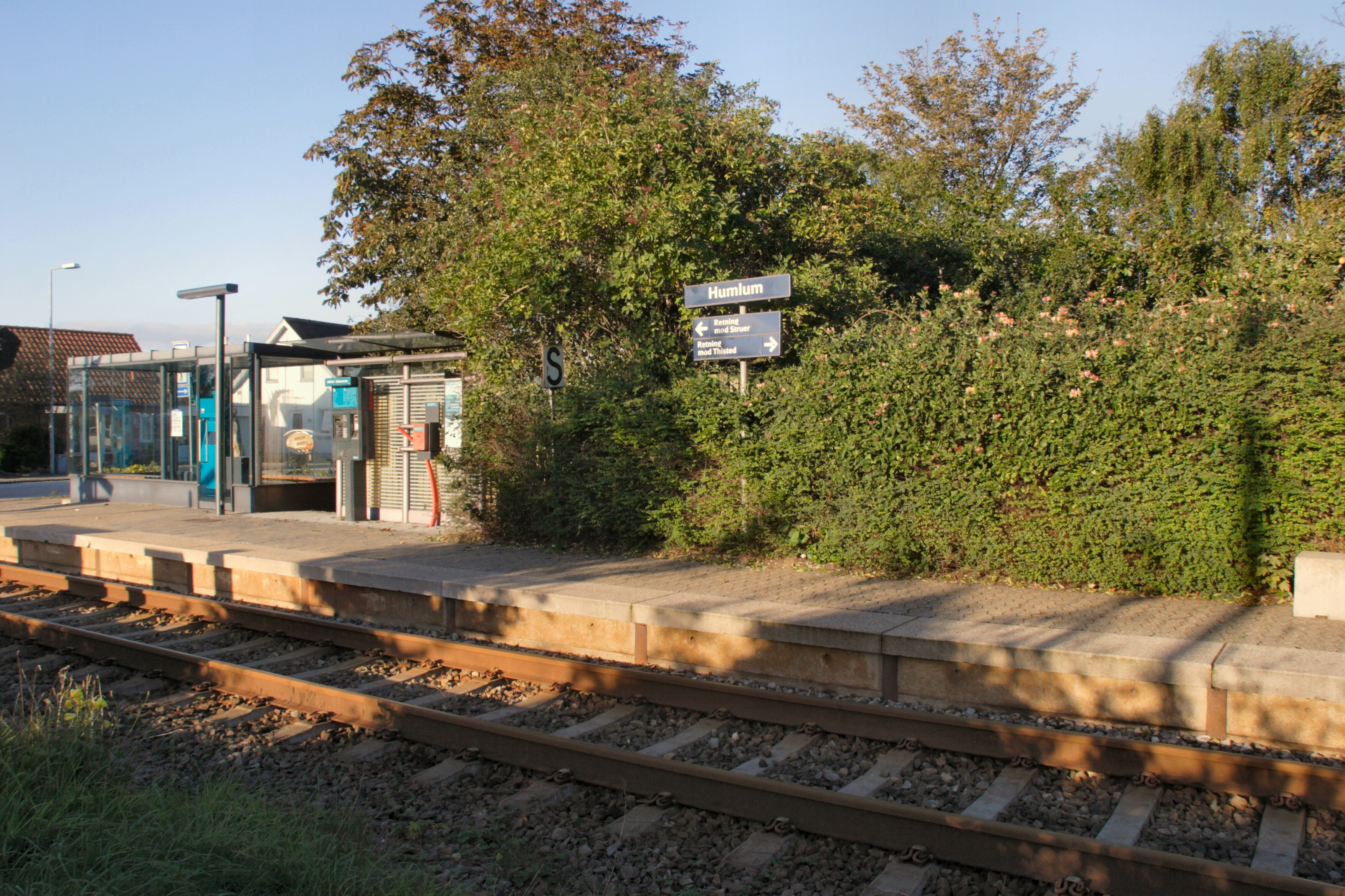 Humlum Station